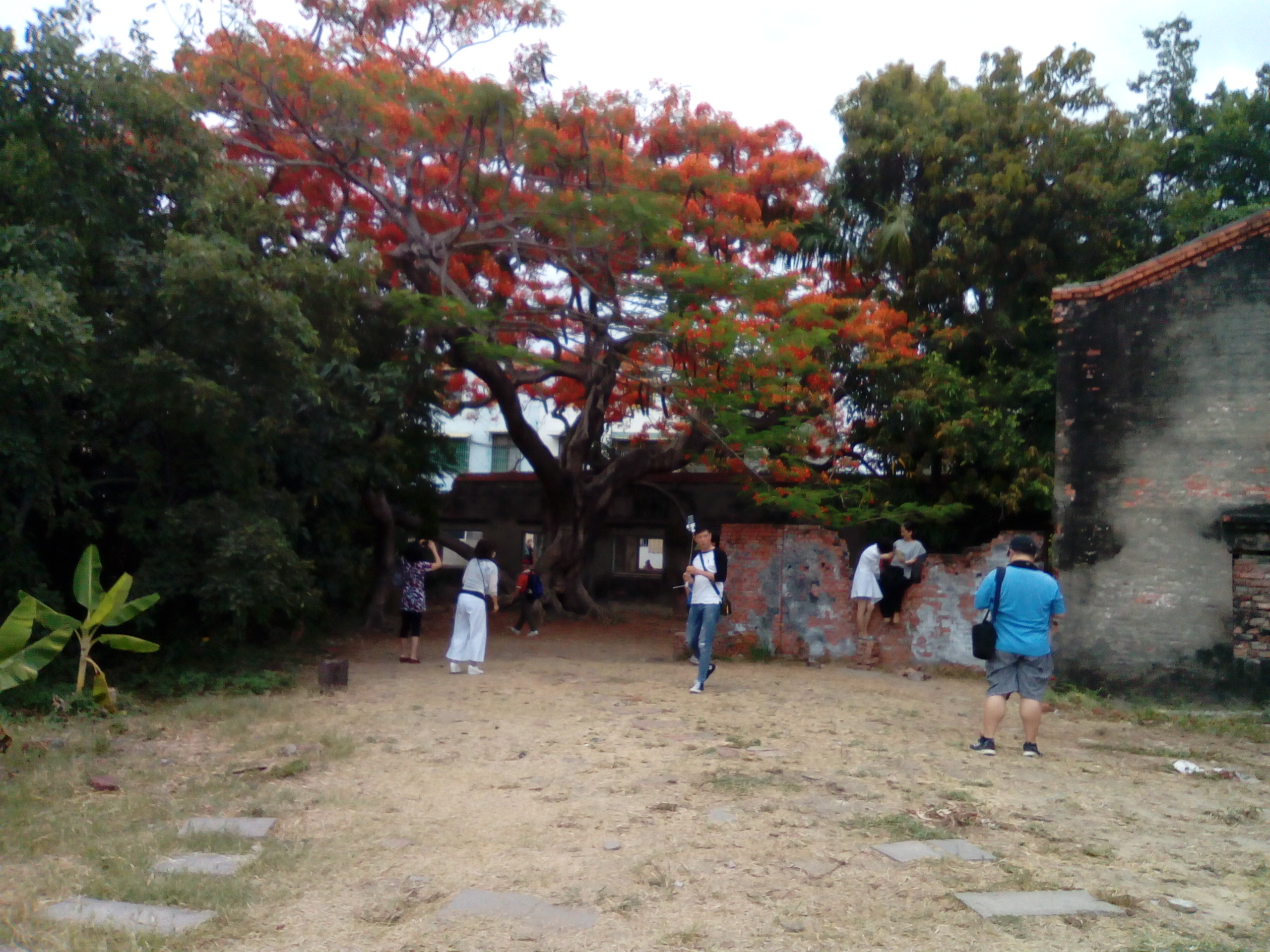 中文（台灣）: 高雄市湖內區大湖里新興觀光景點「番茄會社」，在大湖里縱貫公路旁，延縱貫公路北上經高雄市政府警察局湖內派出所直行500公尺即可抵達，一棵盛開的鳳凰木為其最大特點。